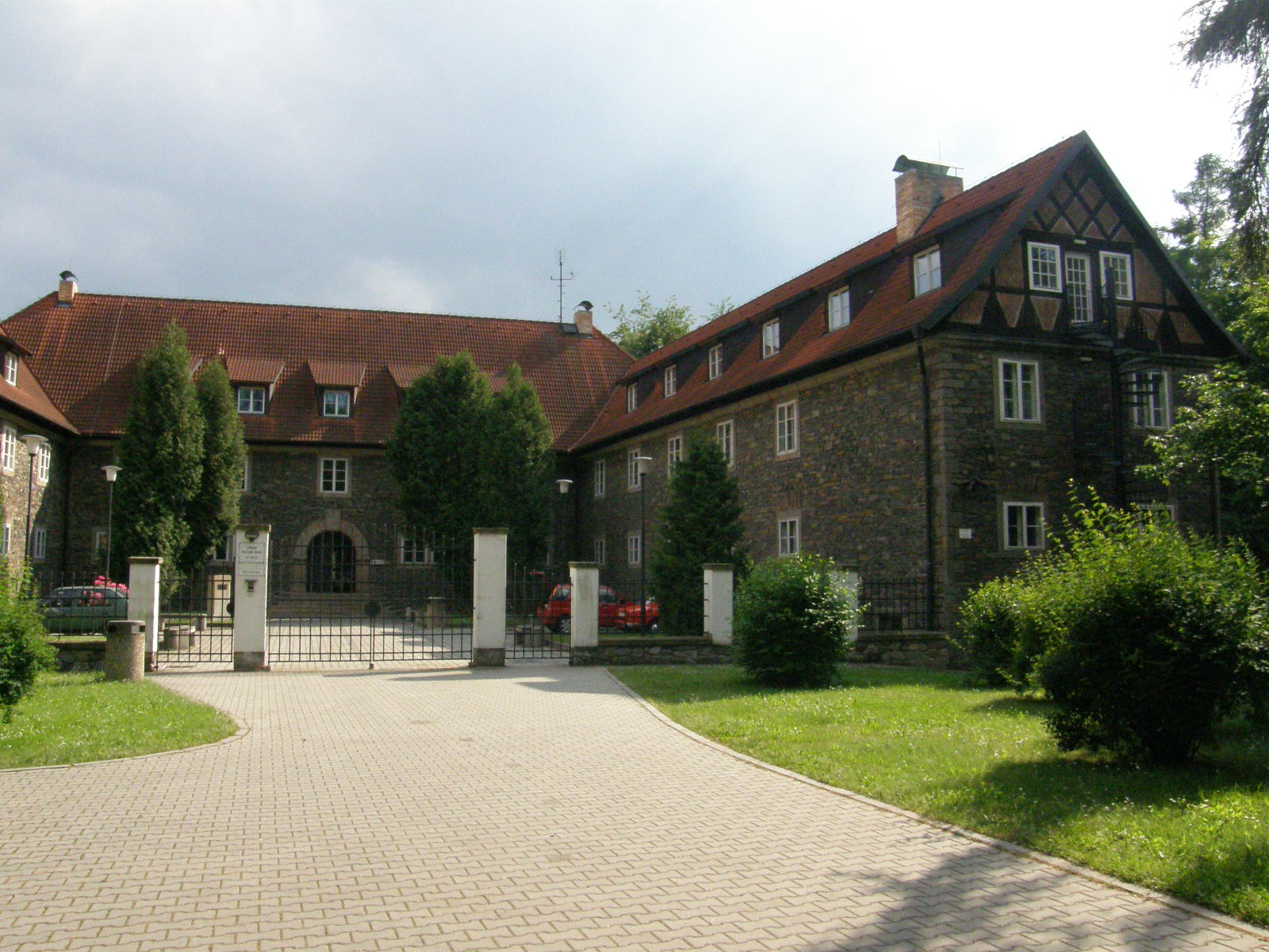 Hrádek v parku Heulos v jihlavě, architekt Fritz G. Winter.